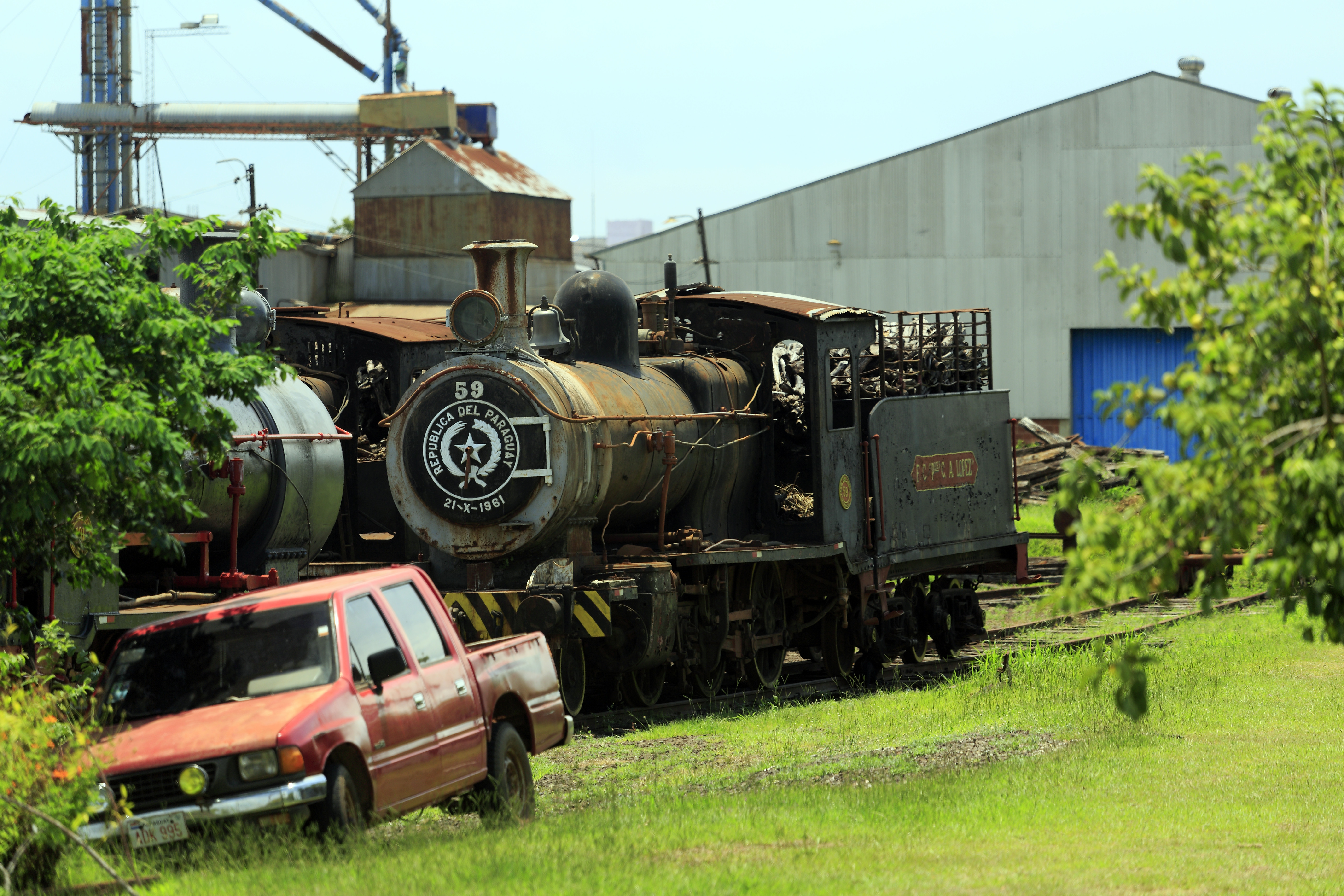 Im Bahnhof Encarnación sind mehrere Dampflokomotiven und unterschiedlich schlechtem Zustand abgestellt. Nach ihren konstruktiven Merkmalen wie Belpaire-Stehkesseln müssen die Maschinen um den ersten Weltkrieg entstanden sein. Eine echte Modernisierung des nie besonders umfangreichen Eisenbahnnetzes von Paraguay hat offenbar niemals stattgefunden. Die Lokomotive 59 macht einschließlich der Holzladung auf dem Tender zumindest von Weitem einen noch recht vollständigen Eindruck.